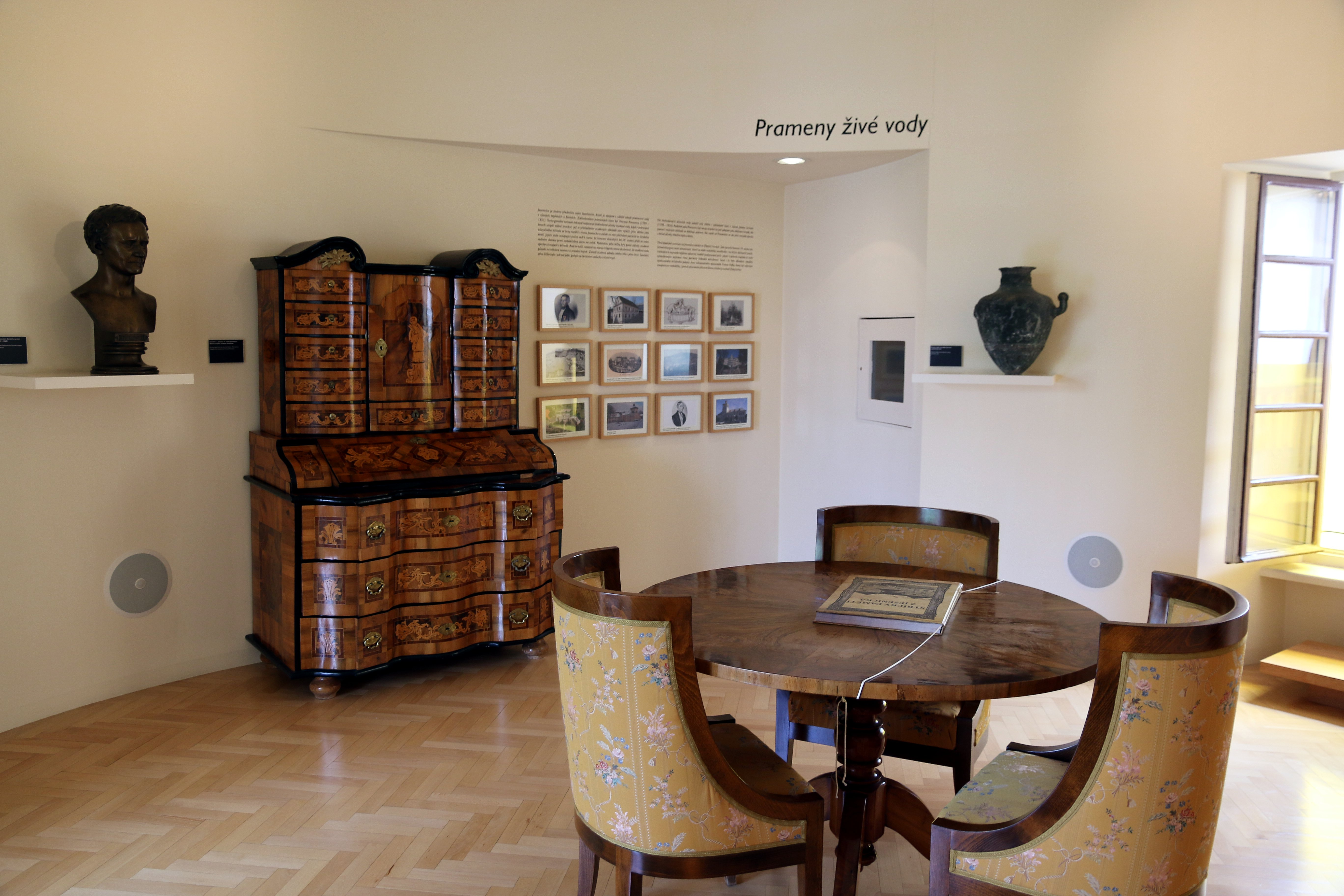 Exposition of History (Museum of Jeseník District)